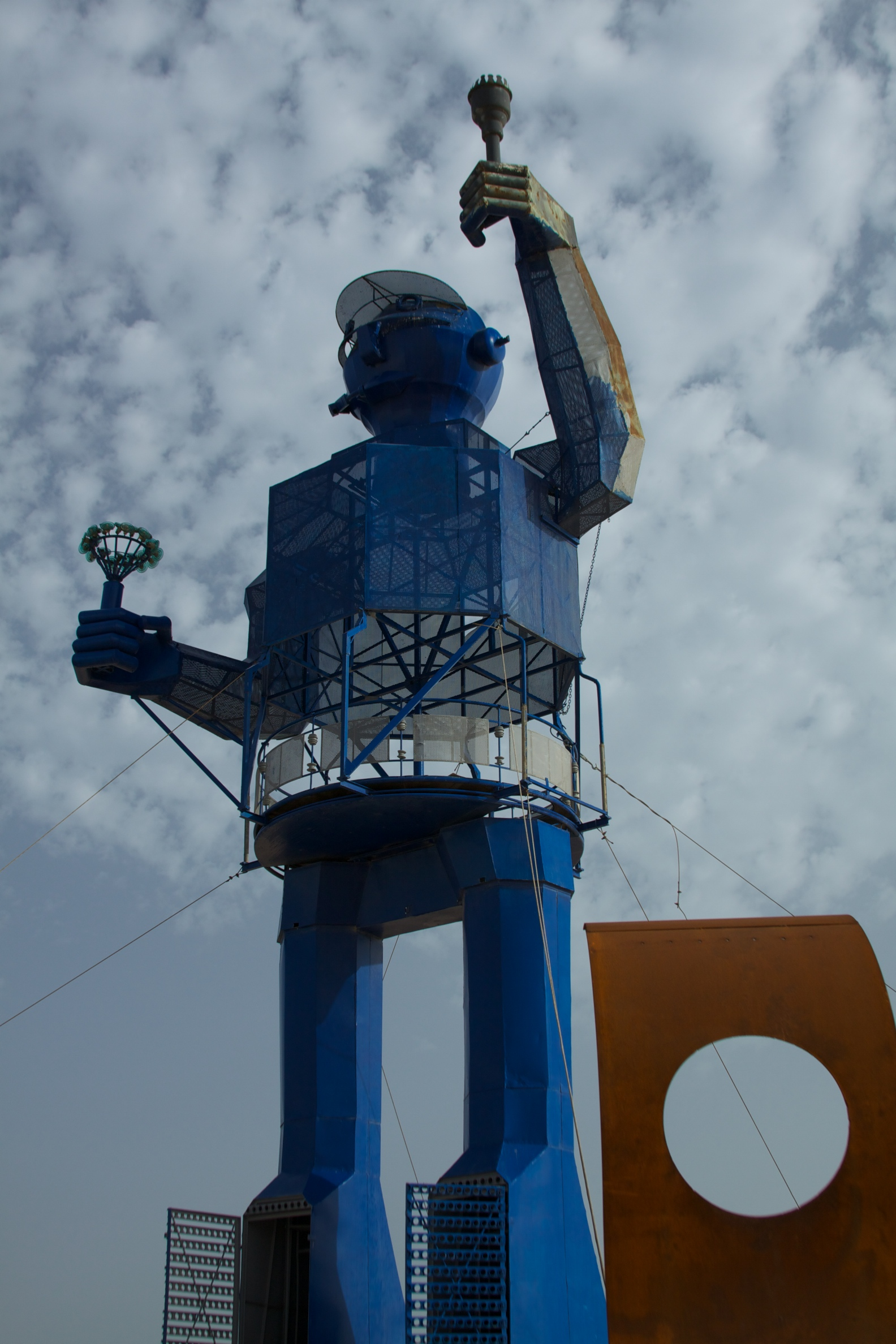 Tunisia 10-12 - 048